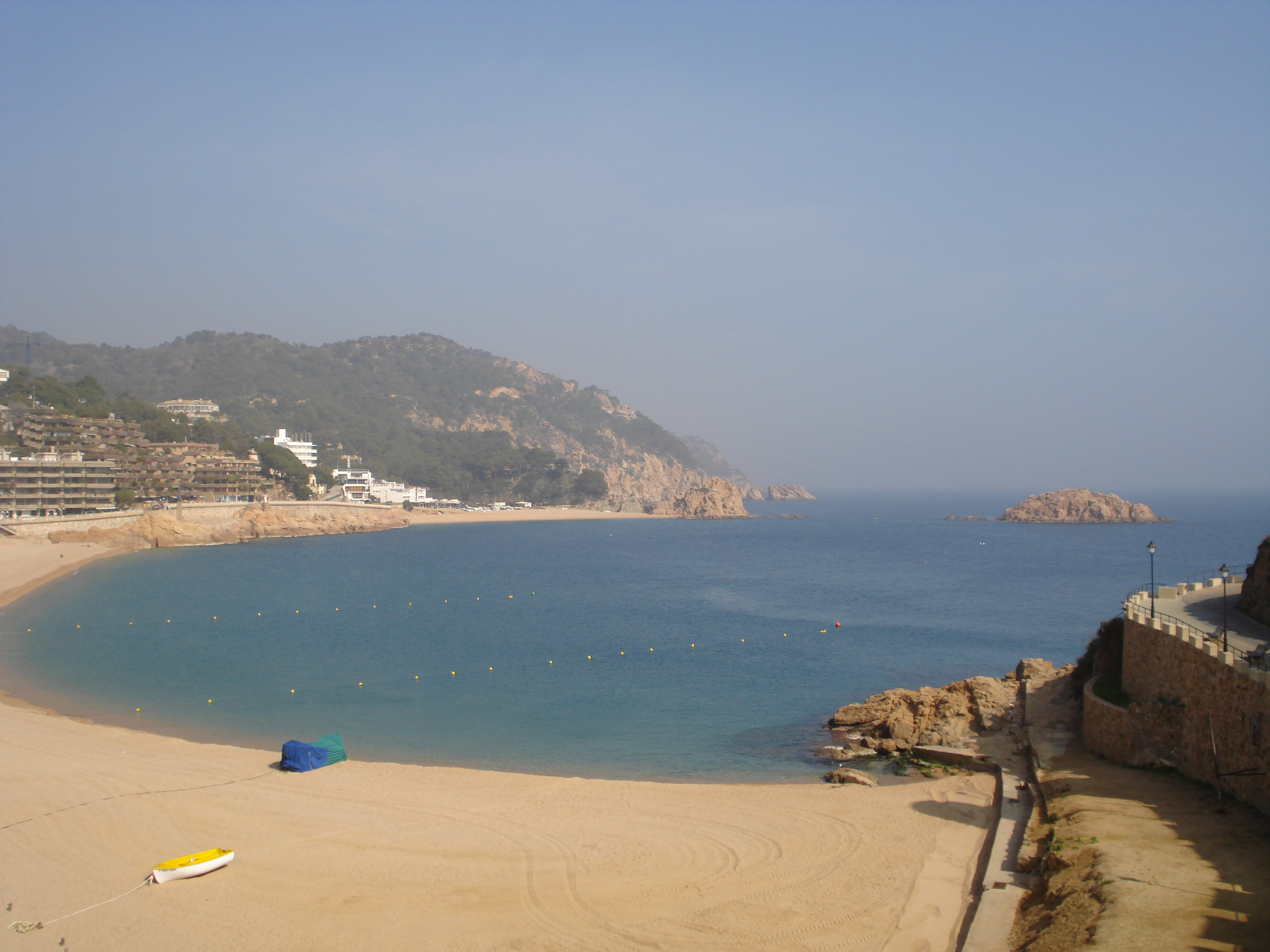 Playa de Tossa de Mar (Girona)